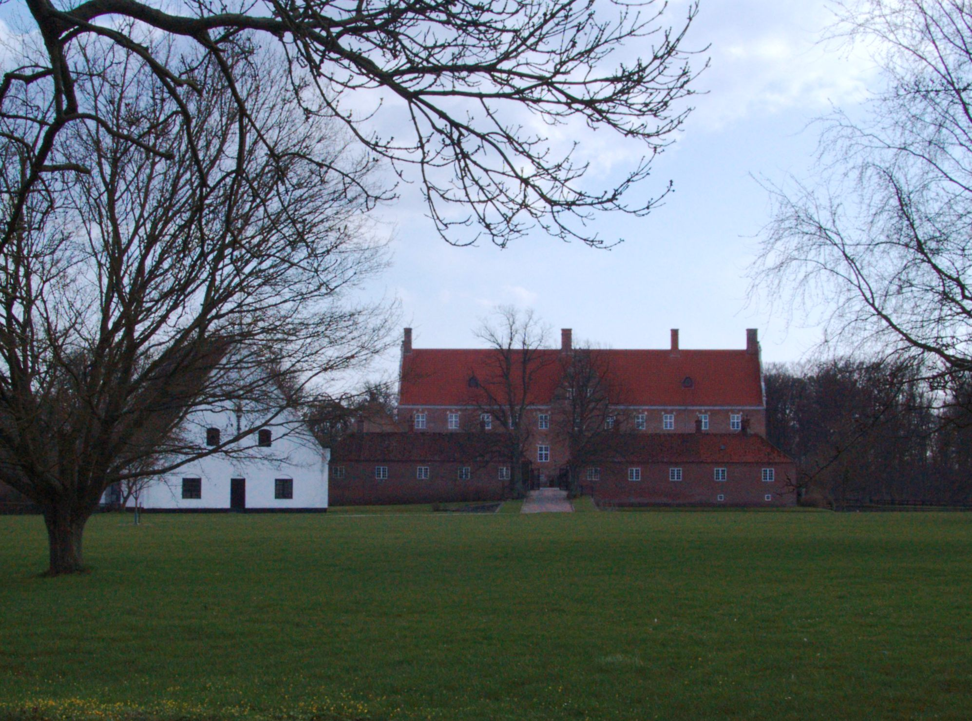 Gyldensteen Palace (Gyldensteen Slot) near Bogense on Northern Funen (Nordfyn) in Denmark